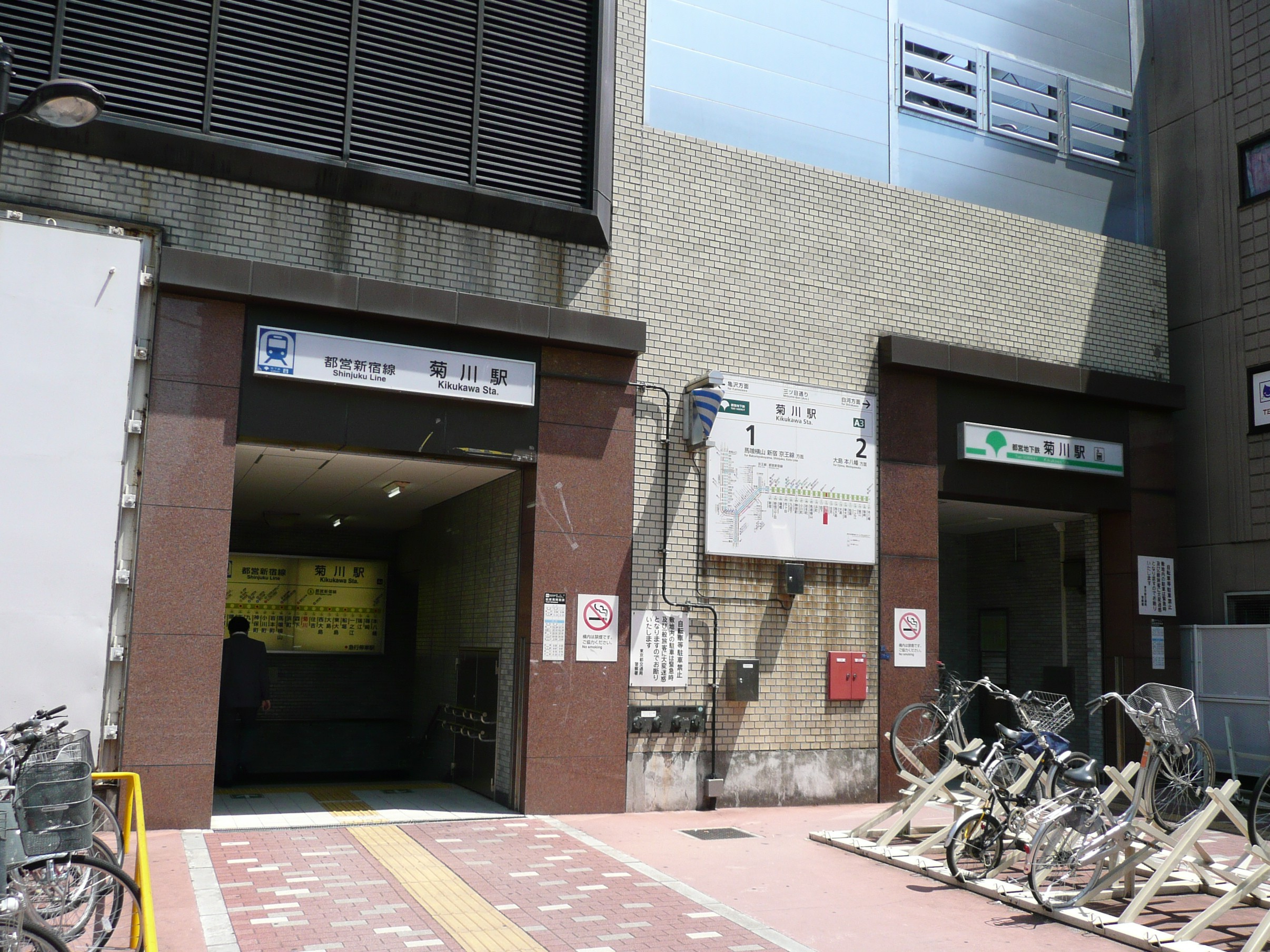 菊川駅A3出入口